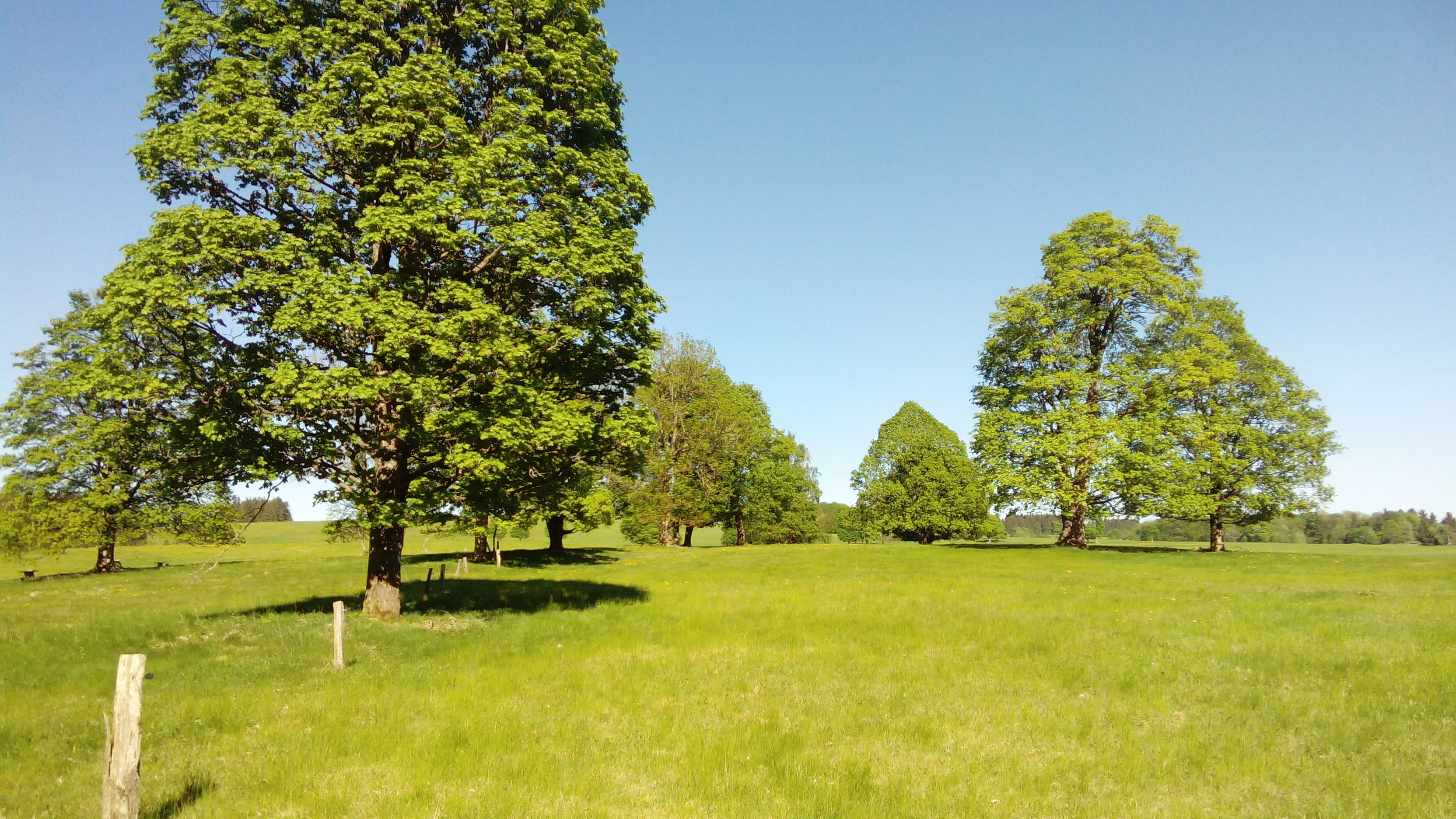 Místo, kde dříve stála osada Zadní Zahájí, okres Tachov.